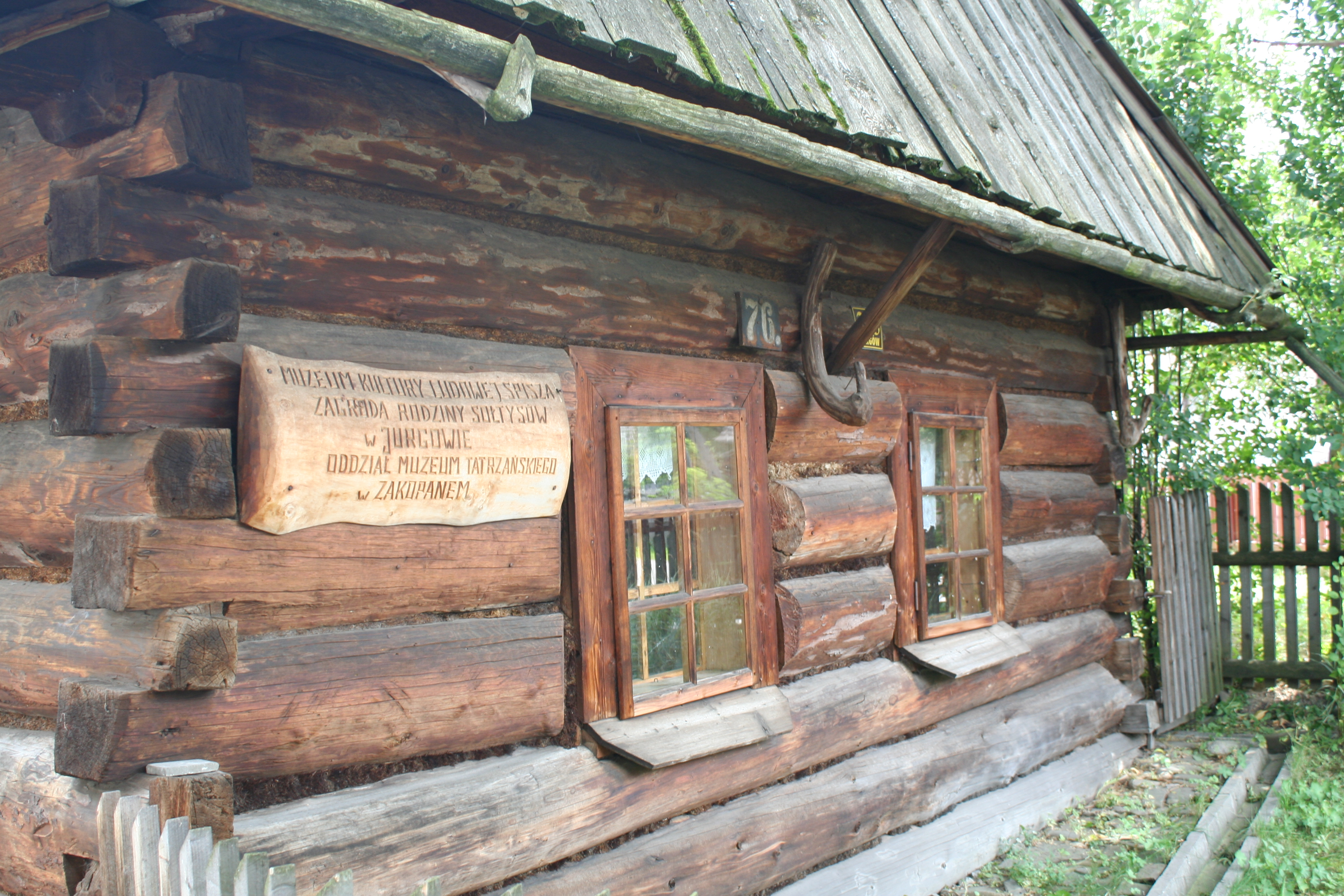 zagroda nr 215 Jurgów, Bukowina Tatrzańska